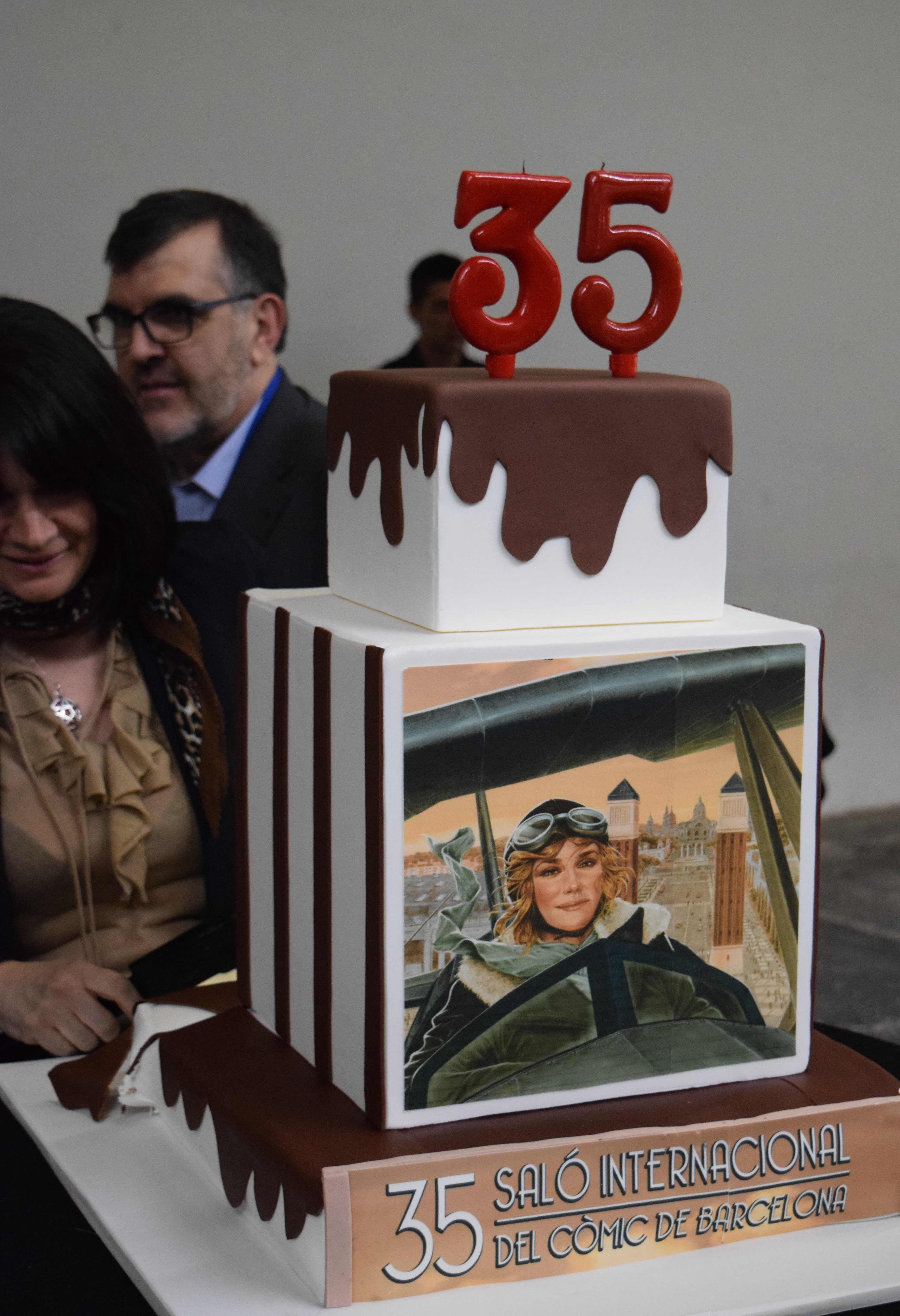 Pastís d'aniversari en motiu de la 35a edició Saló Internacional del Còmic de Barcelona (2017).